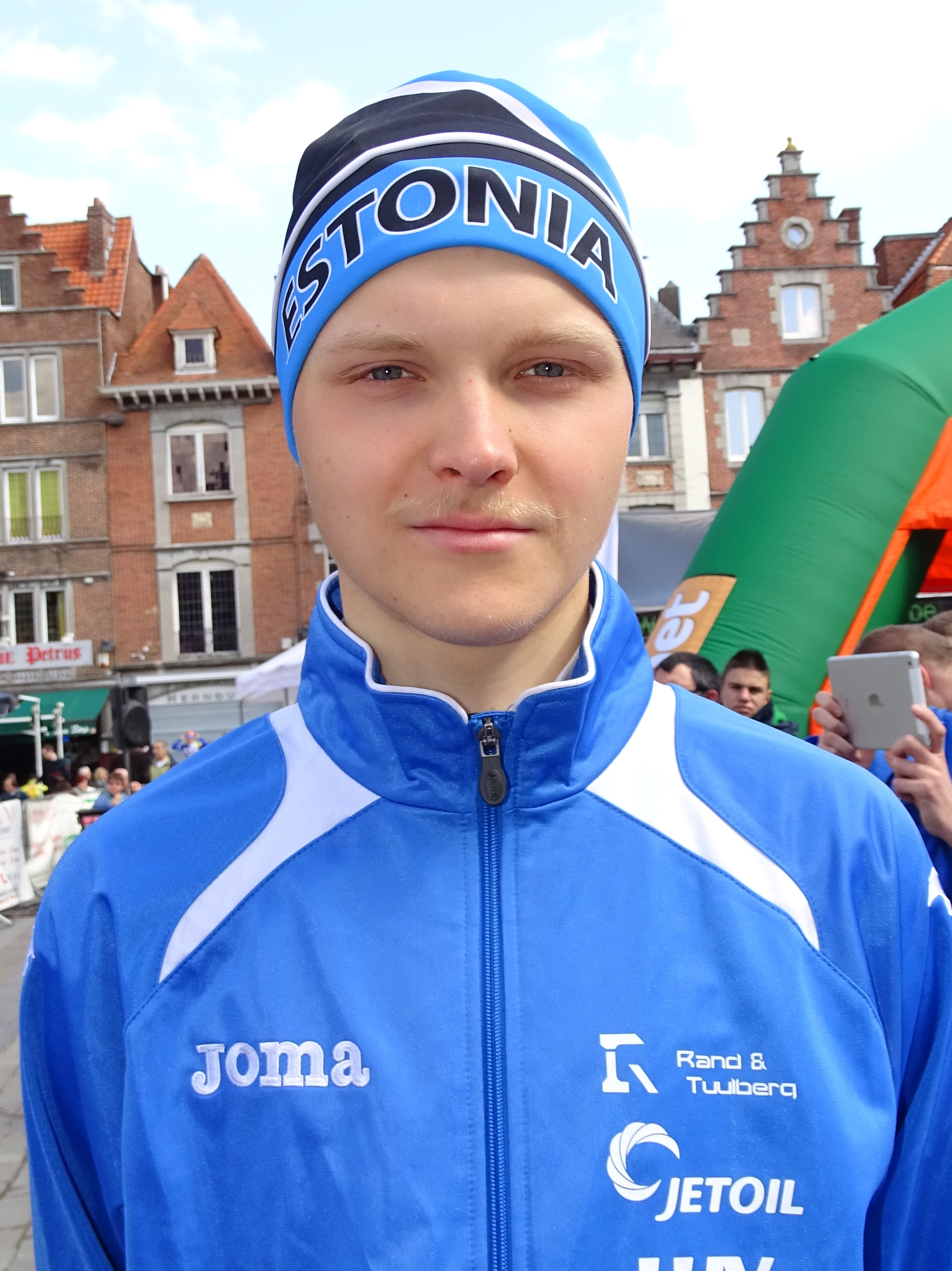 Triptyque des Monts et Châteaux 2015 Depicted person: Josten Vaidem Depicted team: Équipe nationale d'Estonie espoirs